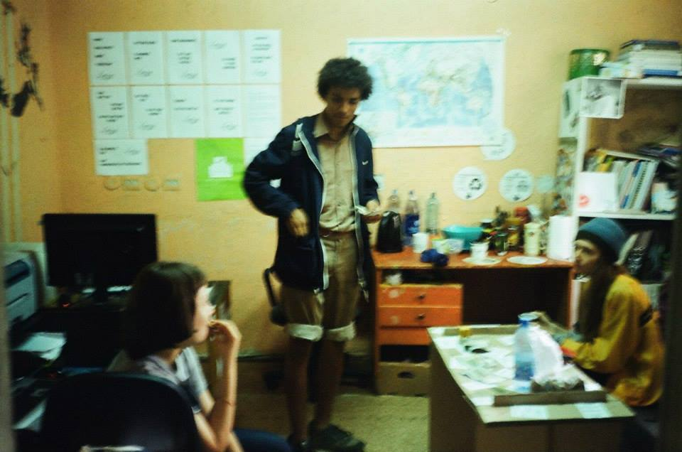 Офис "Фиальты"